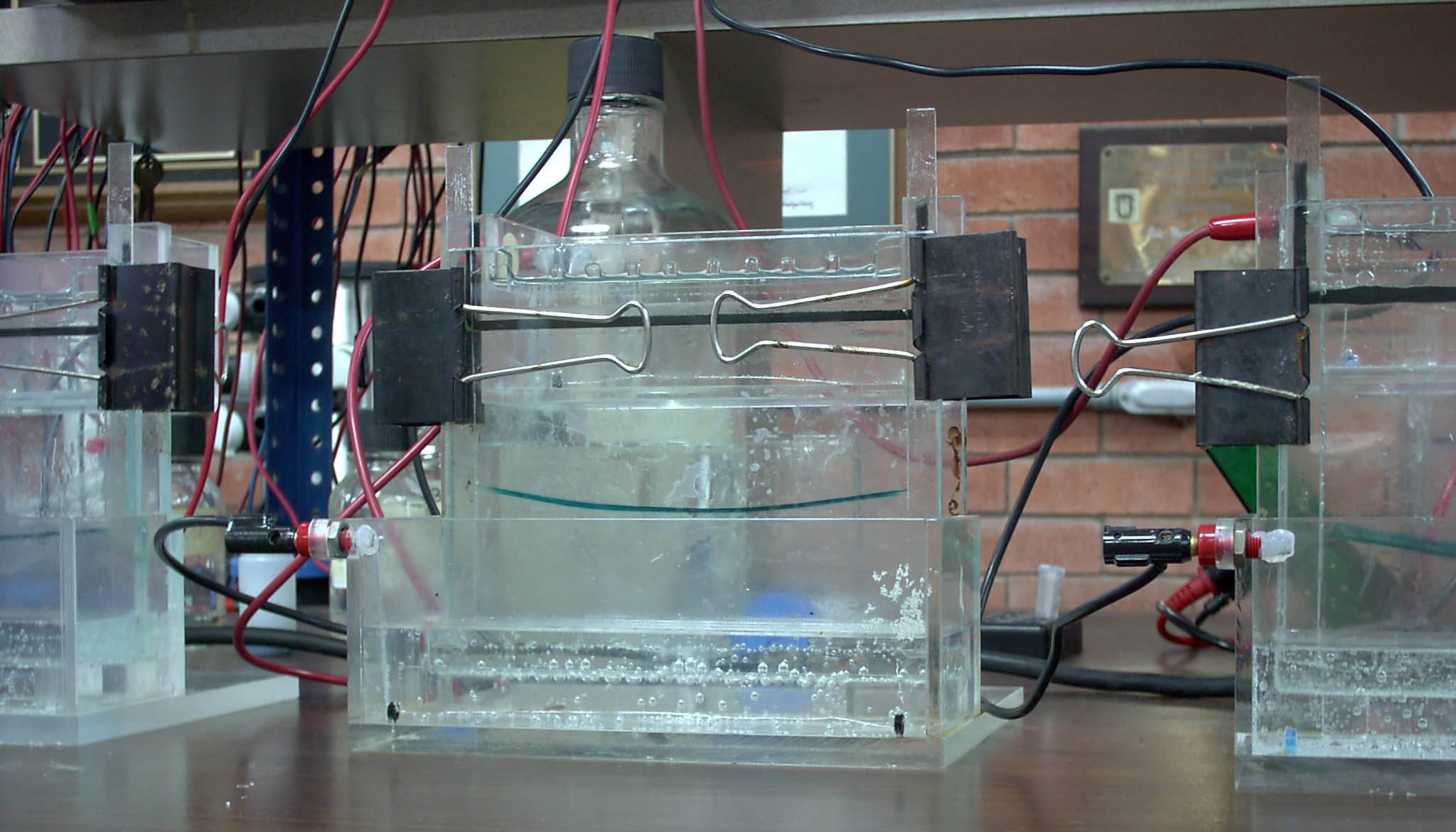 Versuchsaufbau einer Biologie-Studentin, der irgendwelche Zellbestandteile von Seeigelspermazoiden untersucht. Aufgenommen hier genauer im Campus Ensenada